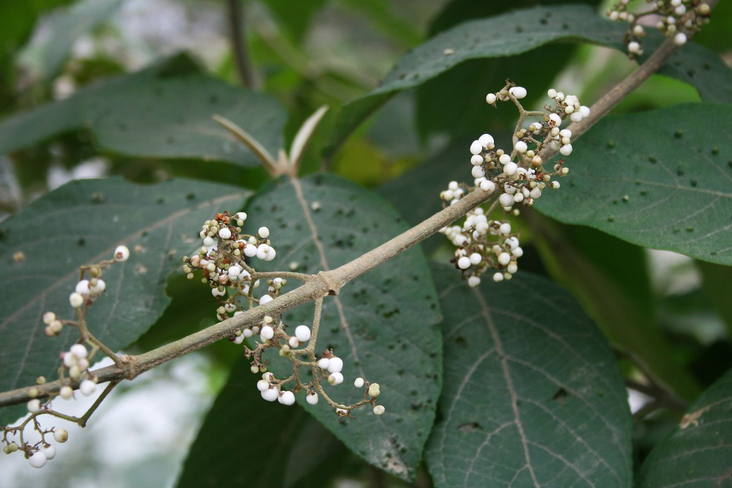 Callicarpa macrophylla, Lippenblütler (Lamiaceae) - Vietnam/Việt Nam: Mường So E Phong Thổ (Prov. Lai Châu)